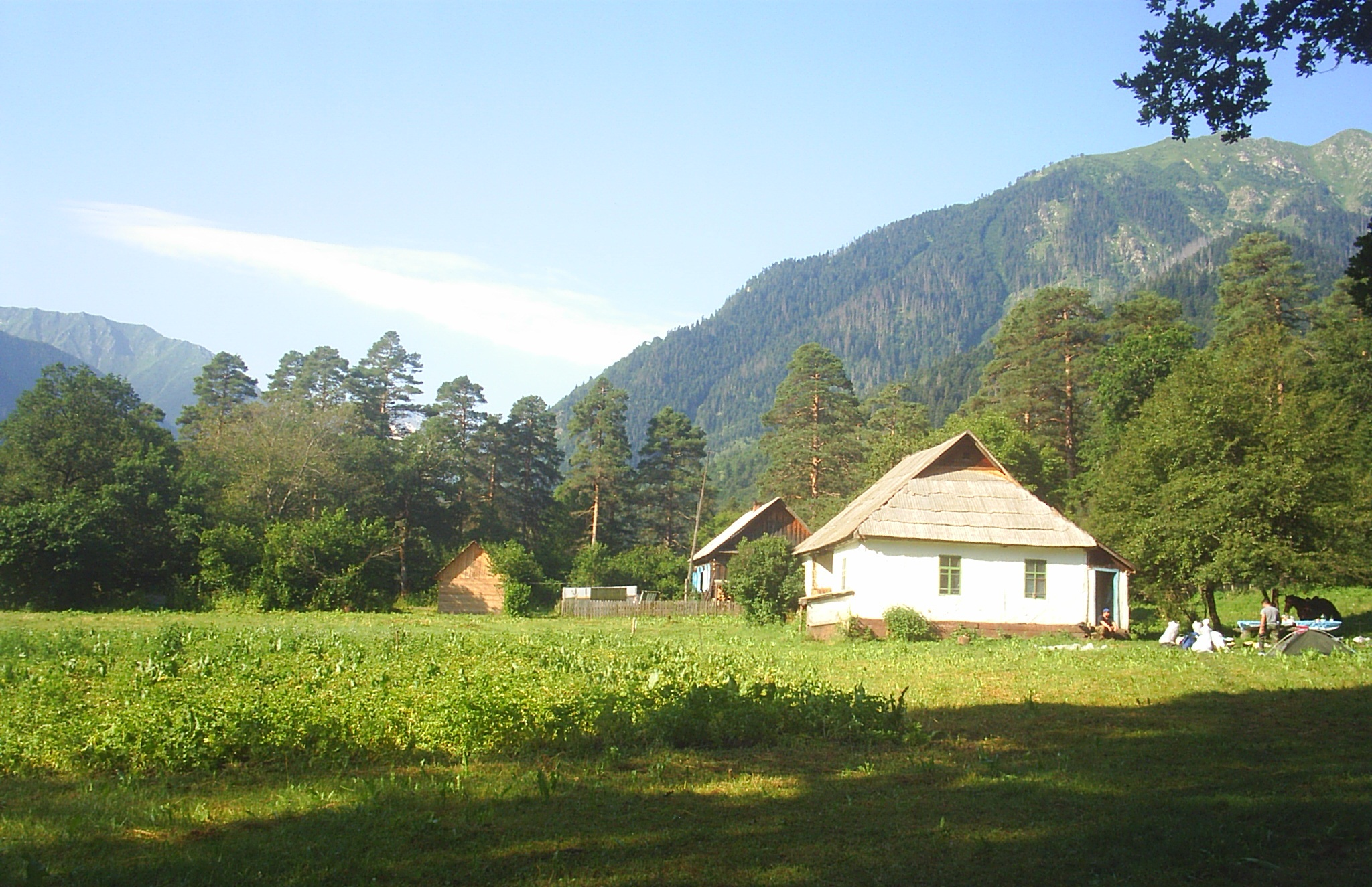 Кордон Умпырь в центральной части Кавказского государственного природного биосферного заповедника